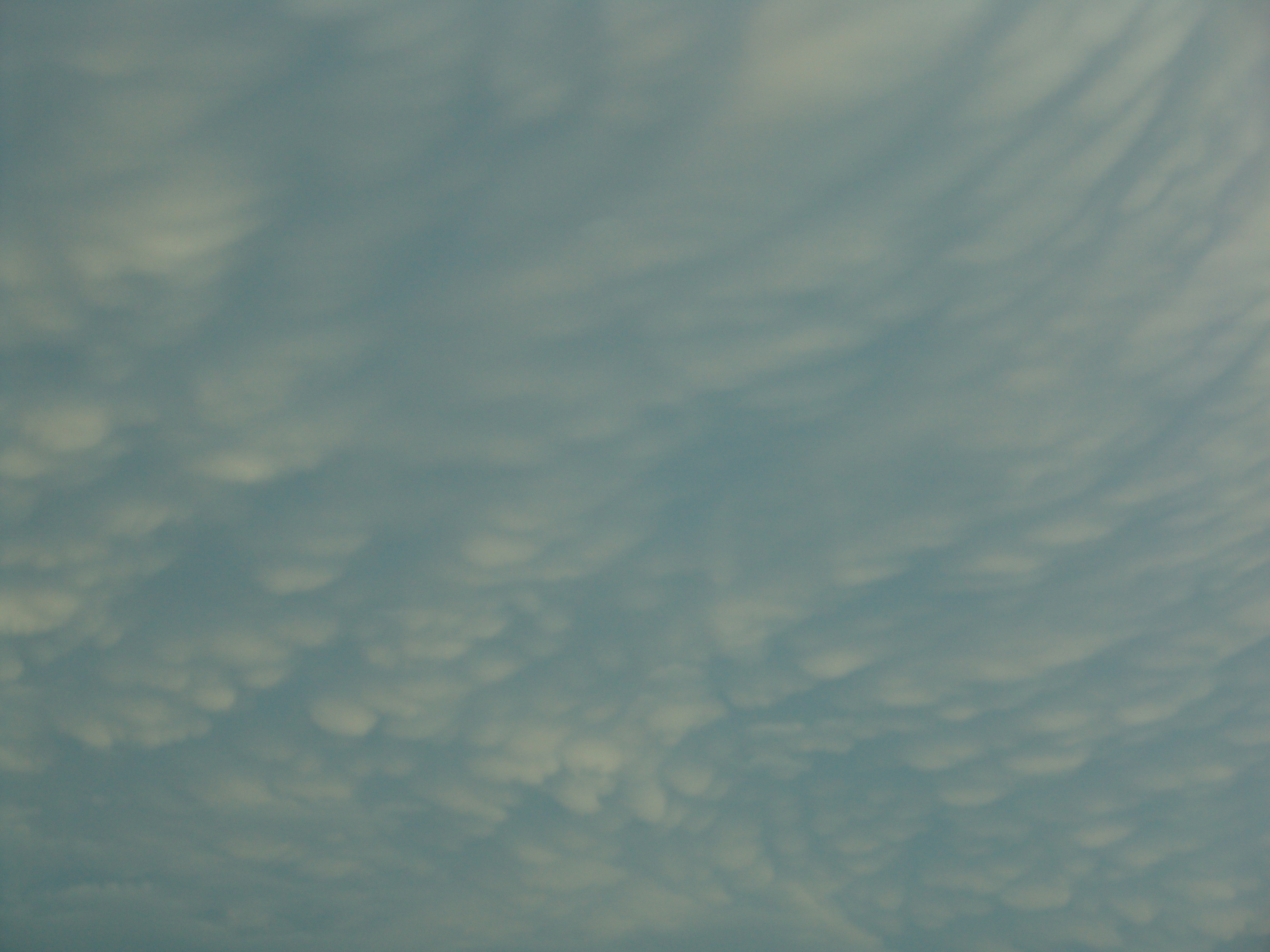 Wolkendek rondom een tornado, in Nebraska op 13 juli 2004.